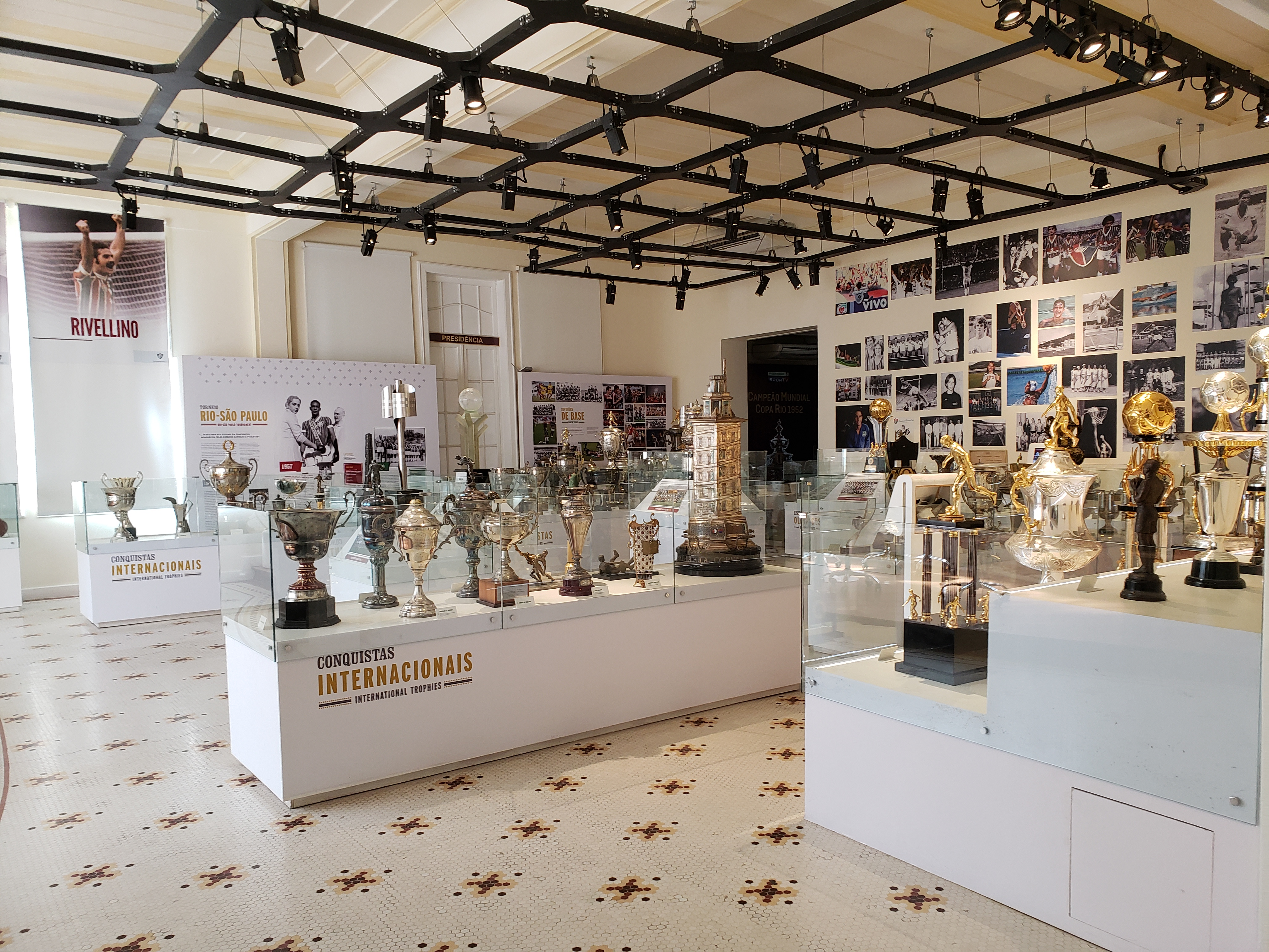 Sala de Troféus do Fluminense Football Club (3).